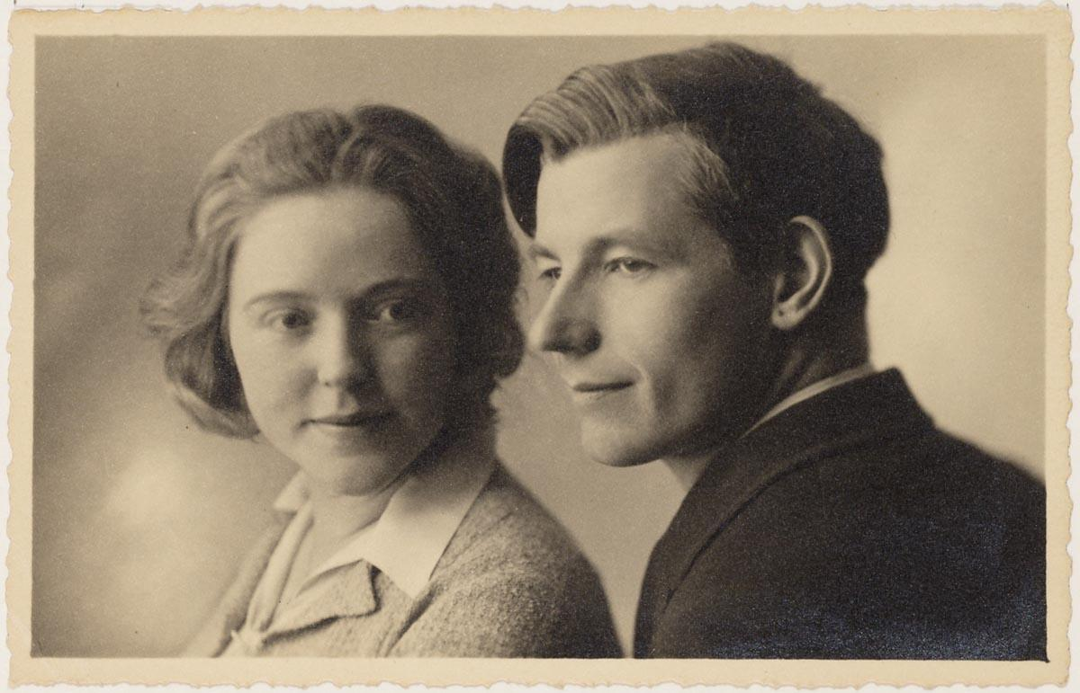 Foto van Darja Collin en Jan Jacob Slauerhoff in Merano (Italië). Verv.jaar: 1934 Bron: S 00646 II 037 (foto), Literaire Hoogtepunten, Letterkundig Museum, Den Haag